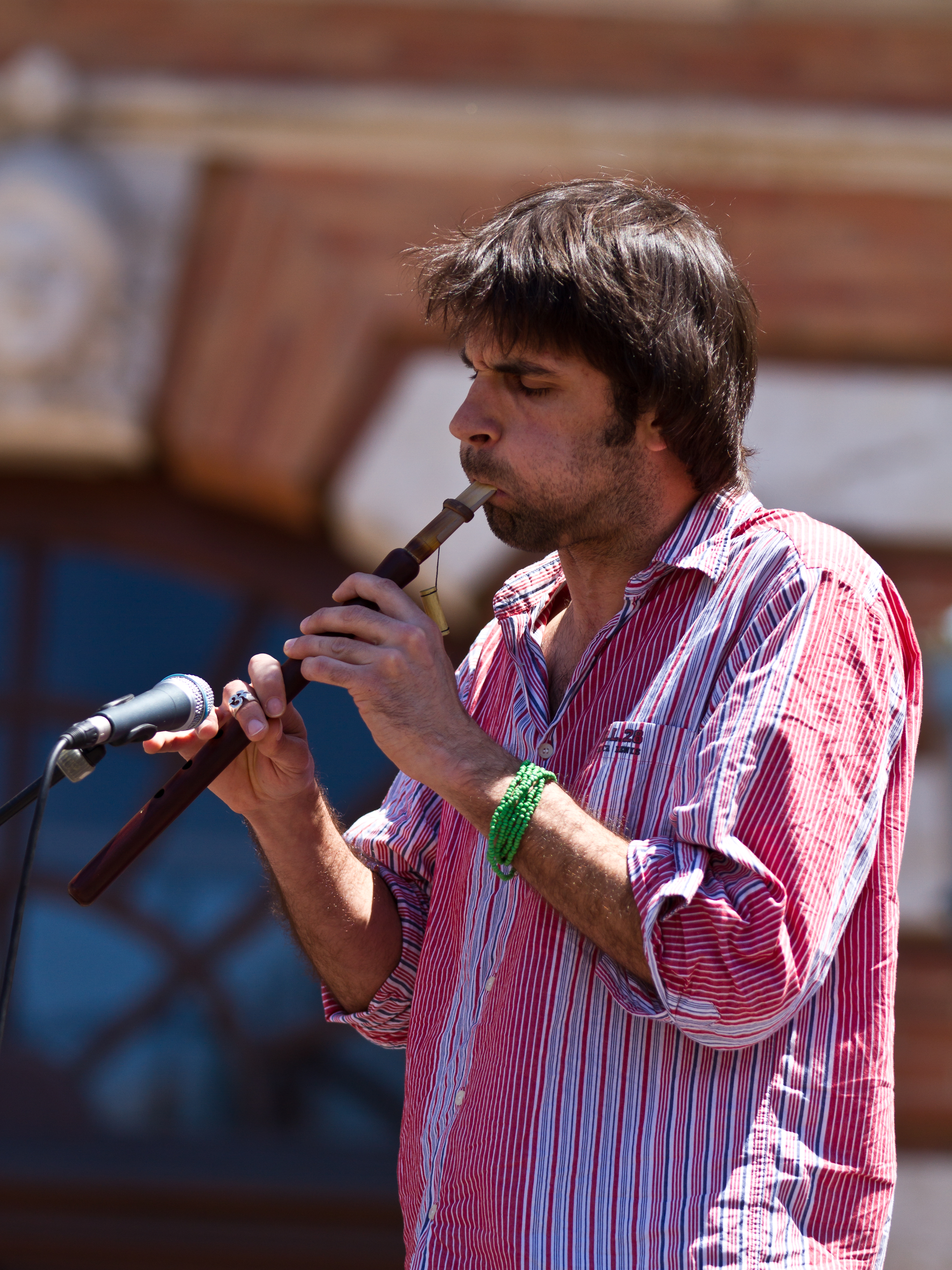 Forom des langues 2013, place du Capitole: musique d'Anatolie, joueur de Duduk